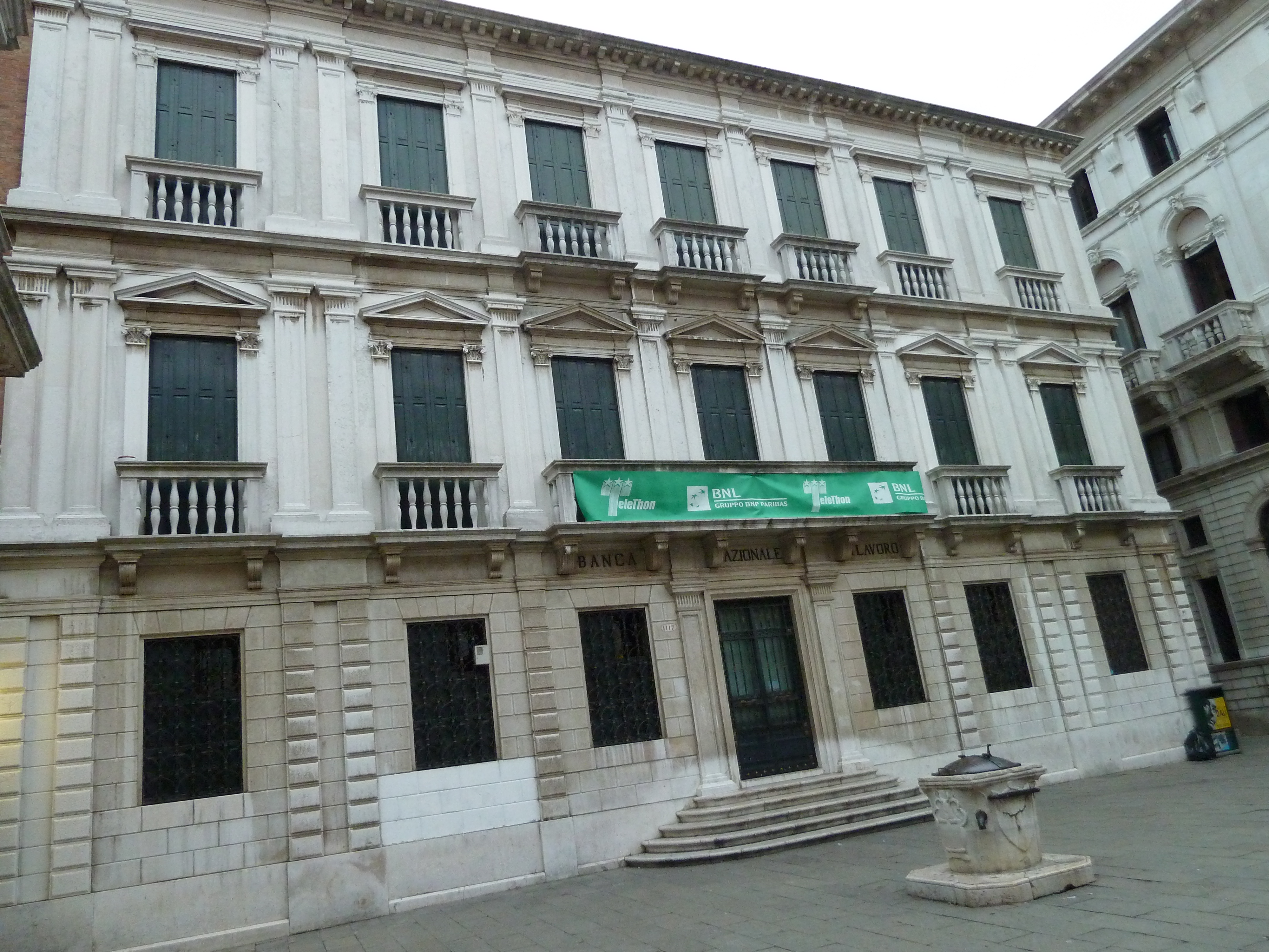 Banca nazionale del lavoro